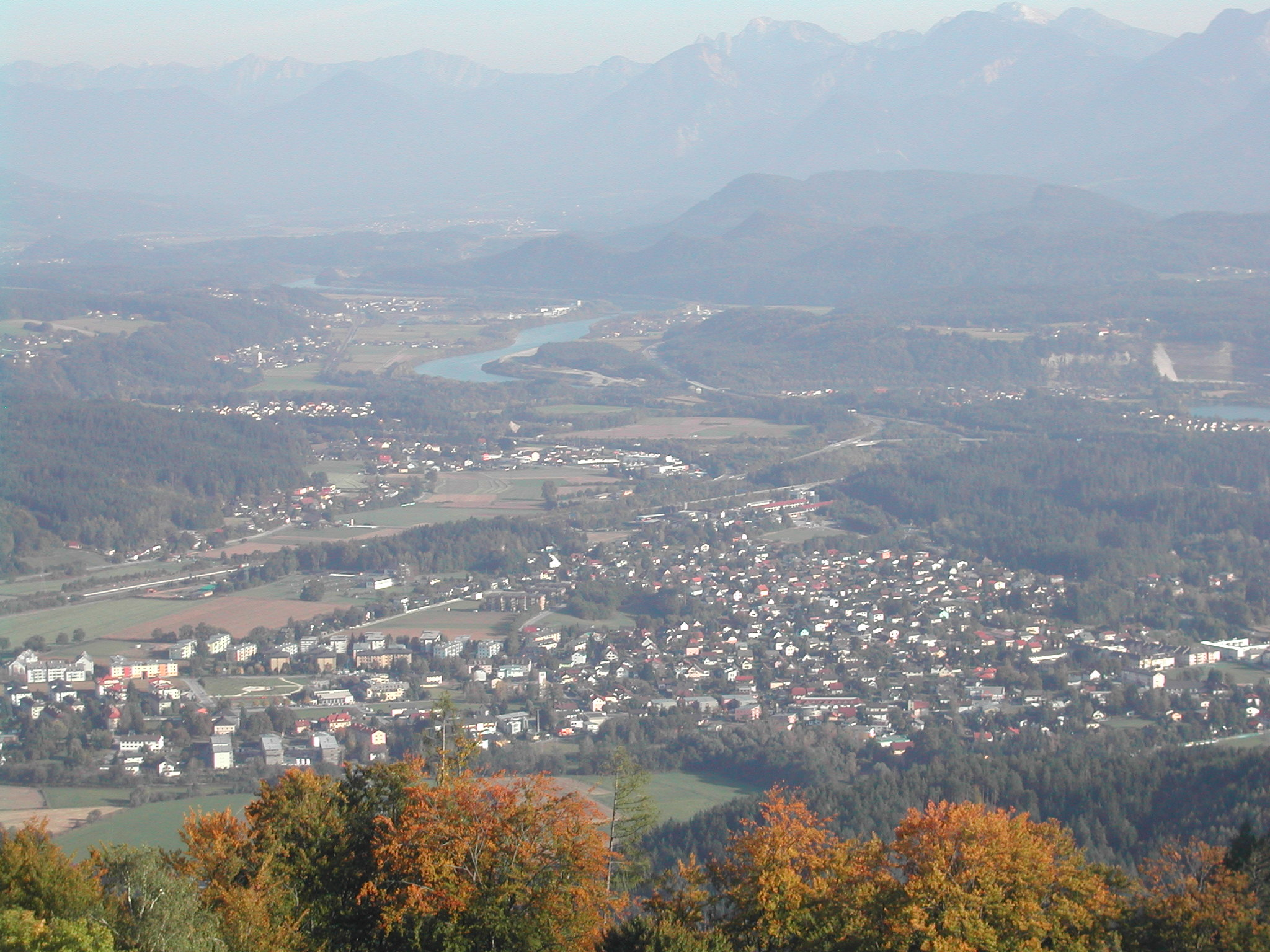 Blick vom Oswaldiberg nach Landskron